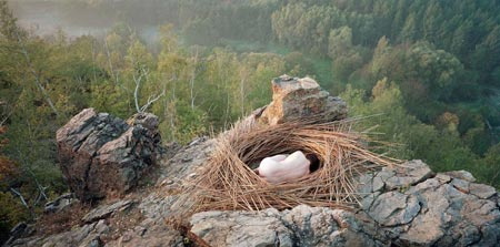 Jan Pohribný, fotografické dílo